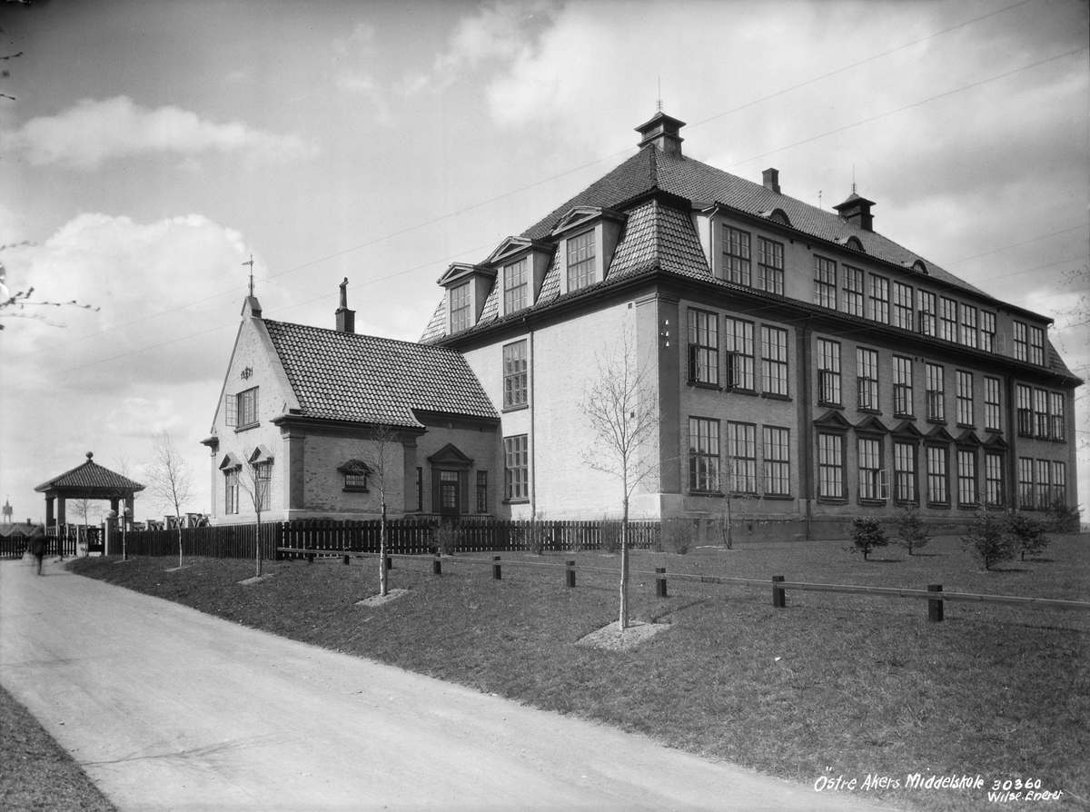 Østre Aker Middelskole, 1927